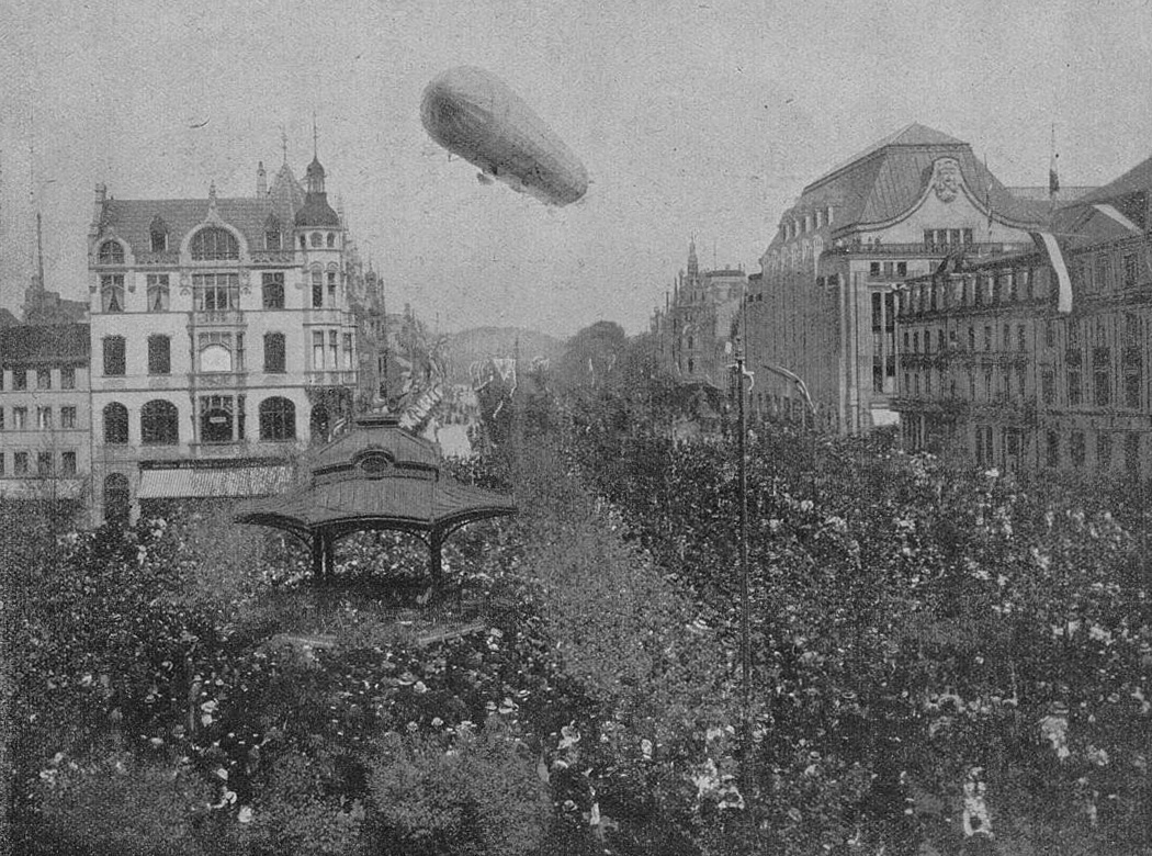 Das Luftschiff "Deutschland" über der Stadt Düsseldorf am Blumentag, 7. Mai 1911, Foto Julius Söhn